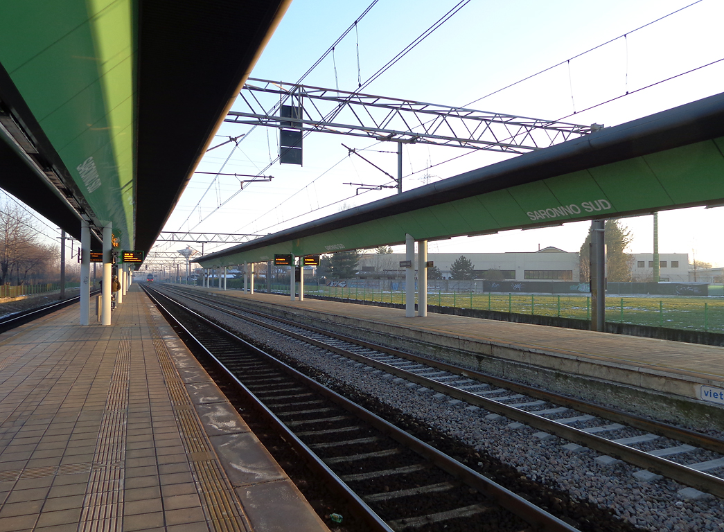 Stazione ferroviaria di Saronno Sud